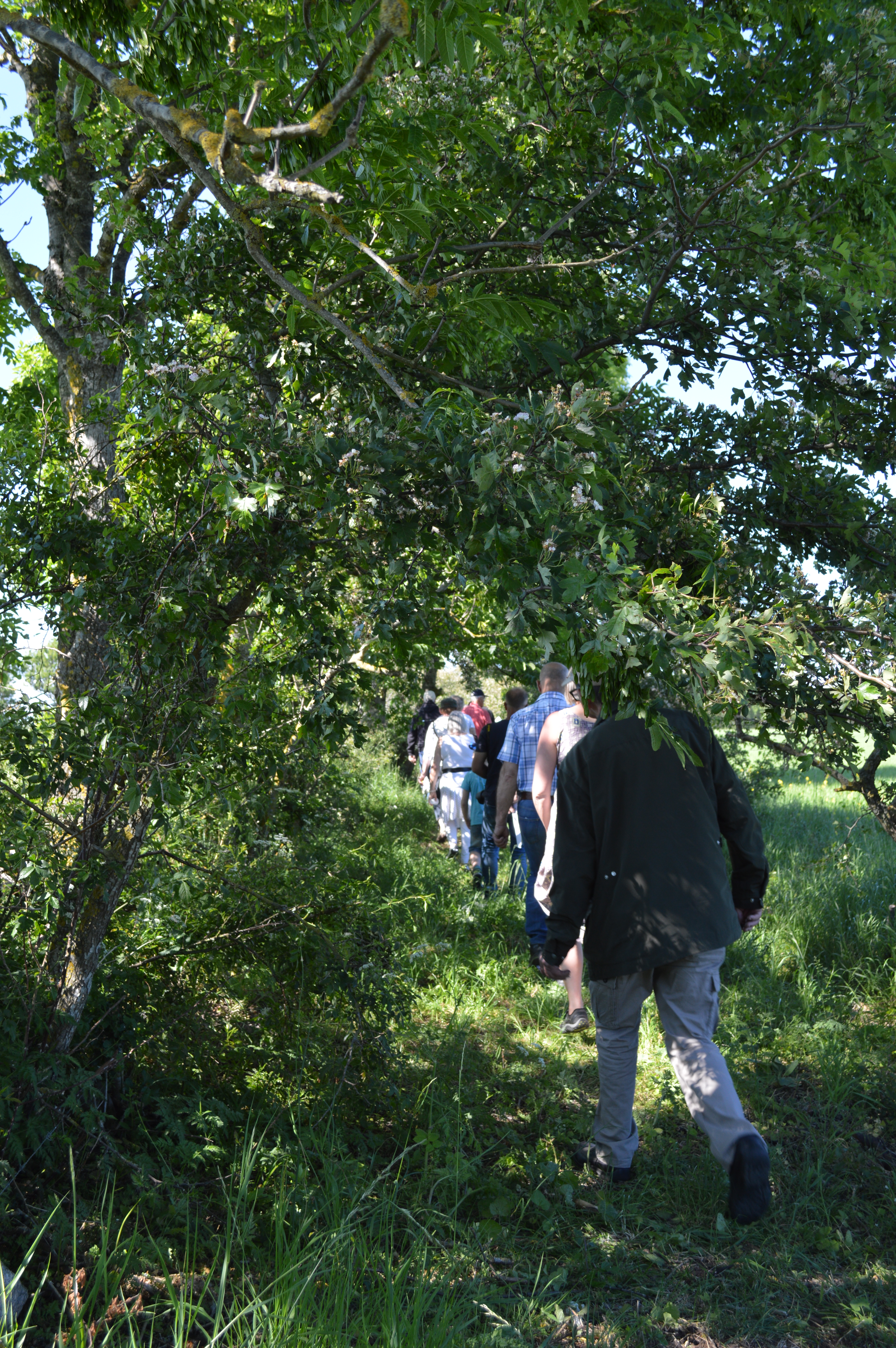 Invigningsvandring på Långlötleden 12 juni 2015. Bilden är tagen där vandringsleden börjar, i nordvästra hörnet av Ölands Museum HImmelsbergas parkering.